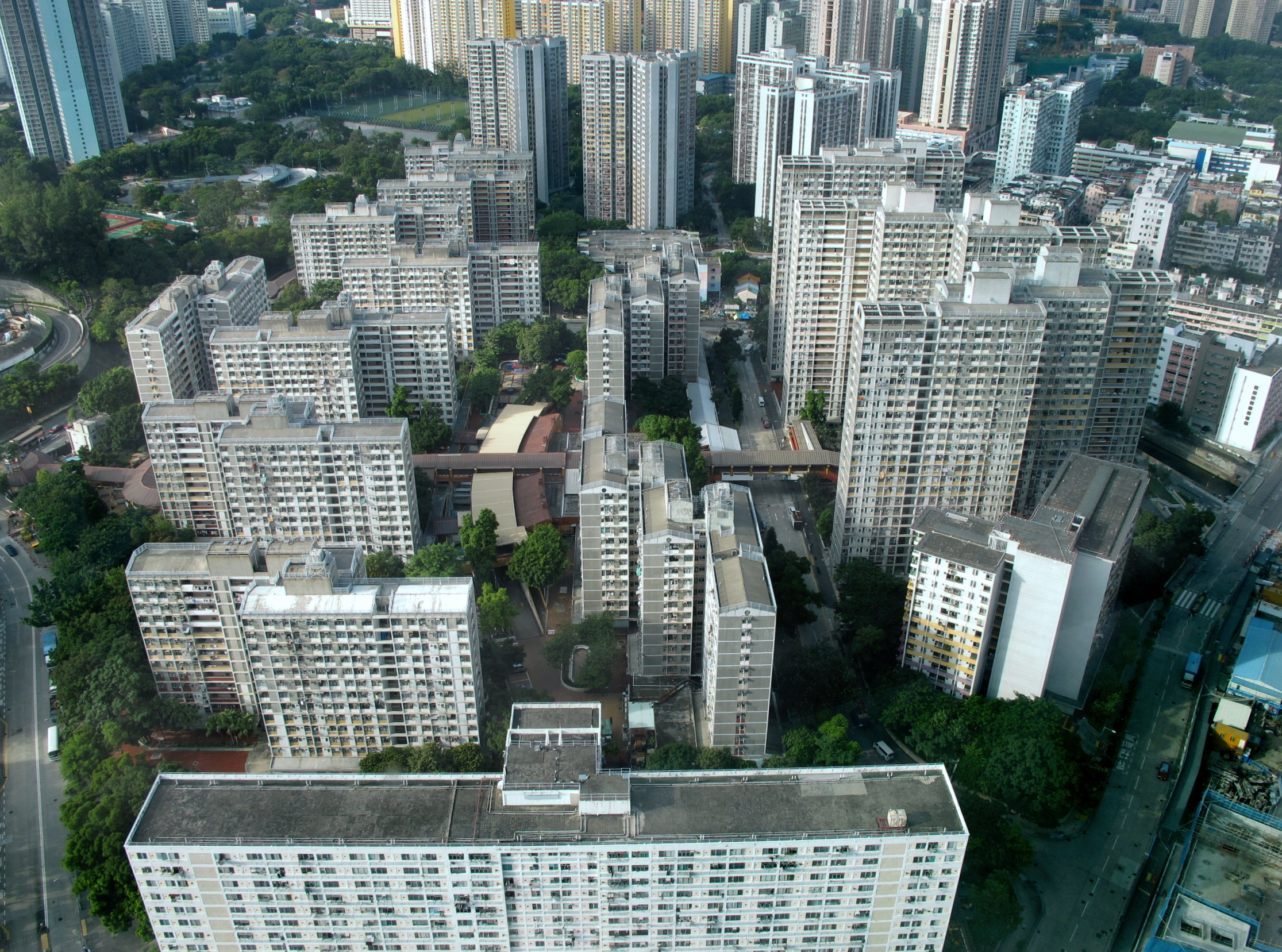 Tung Tau Estate